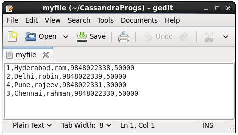 Монгол: Файлын хуулбар